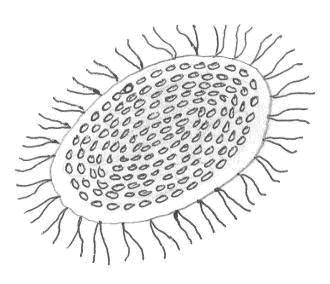 Ово је пример зооспоре коју сам нацртао.